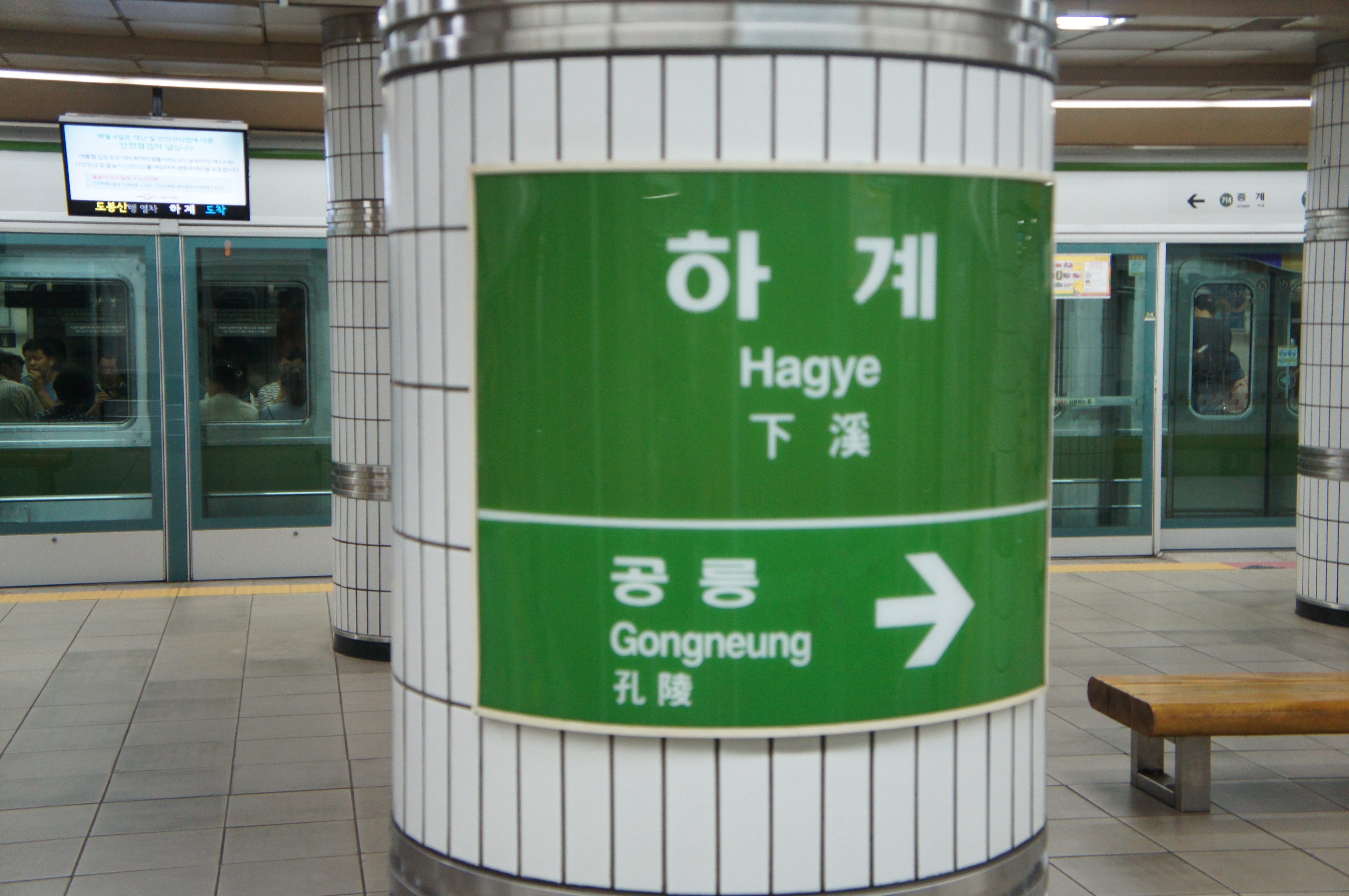 하계역 역명판